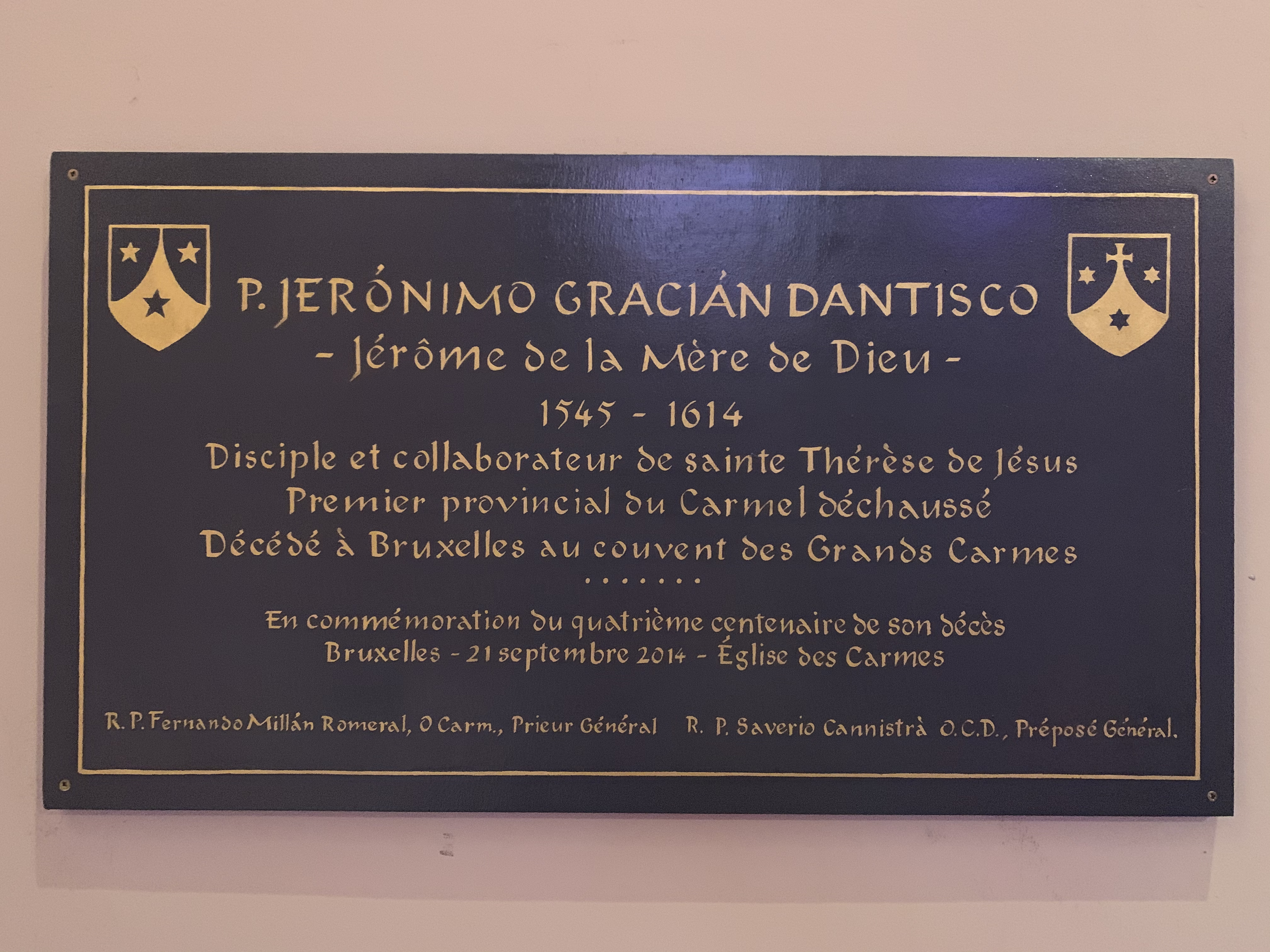 Plaque de commémoration dans le bas côté droit de l'église du couvent des pères carmes de Bruxelles